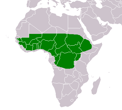 Vitellaria paradoxa distribution